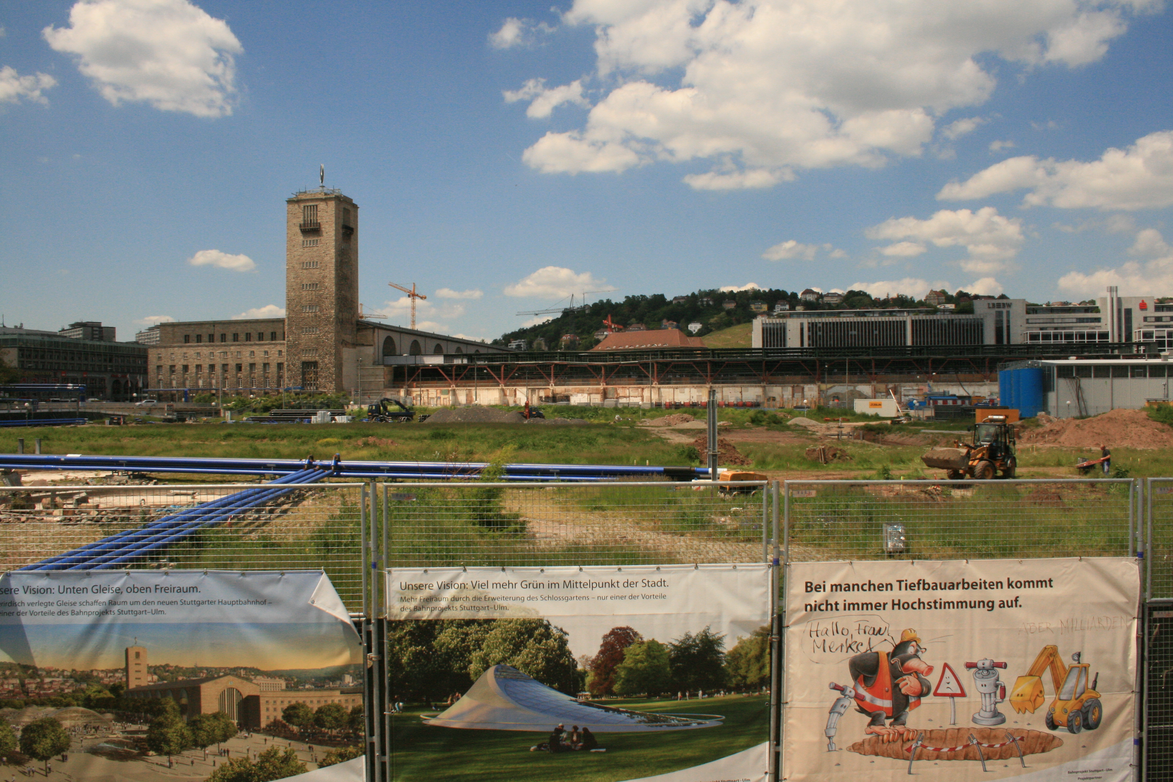 Eingezäuntes Baufeld des geplanten Stuttgarter Hauptbahnhofs im Mittleren Schlossgarten.